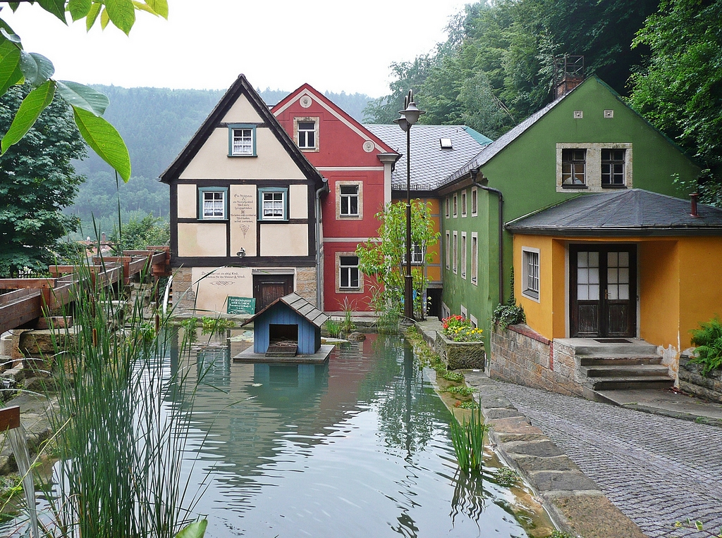 Blick auf die Schmilksche Mühle in Schmilka. Die Wassermühle am Ilmenbach, einem kleinen Zufluss zur Elbe, entstand 1655 und gehört heute zu den ältesten erhaltenen Gebäuden im Ort.